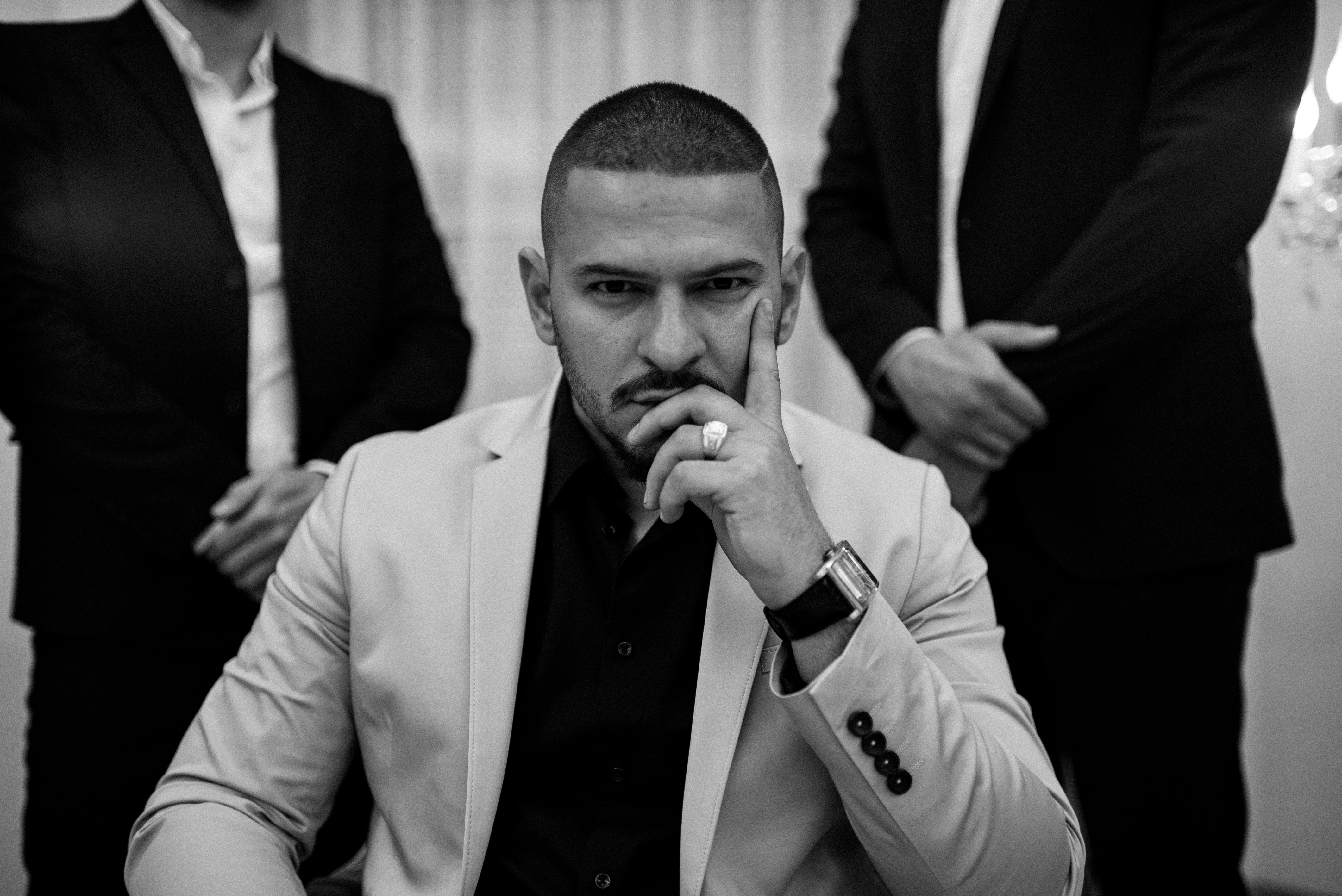 Pressefoto des Rappers Letoh